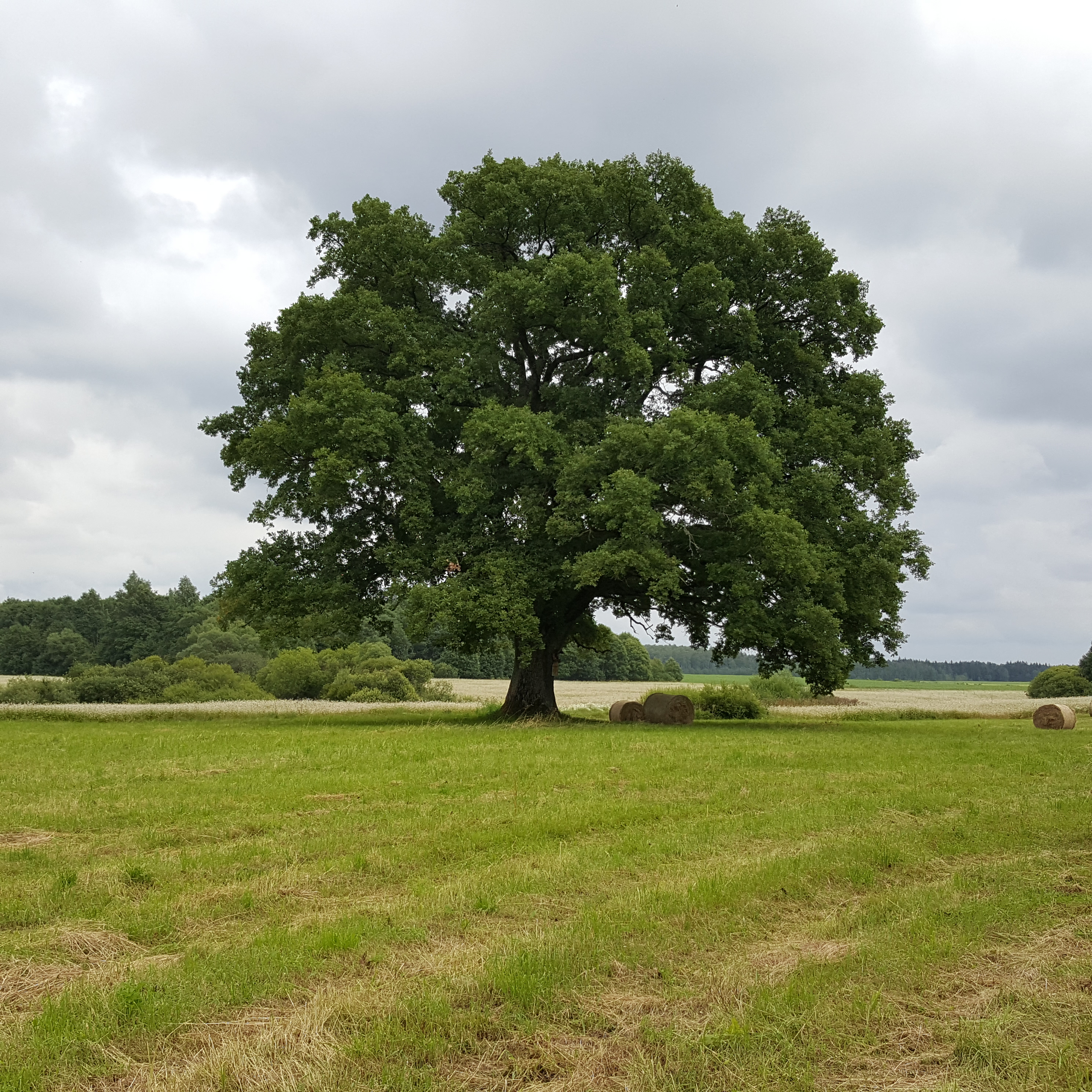 Laibiškių ąžuolas